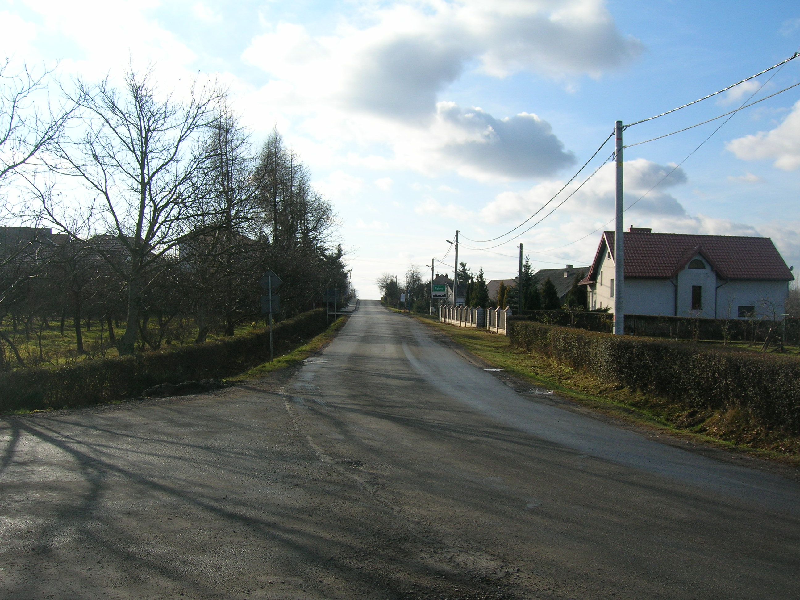 Rybna Nowy Świat